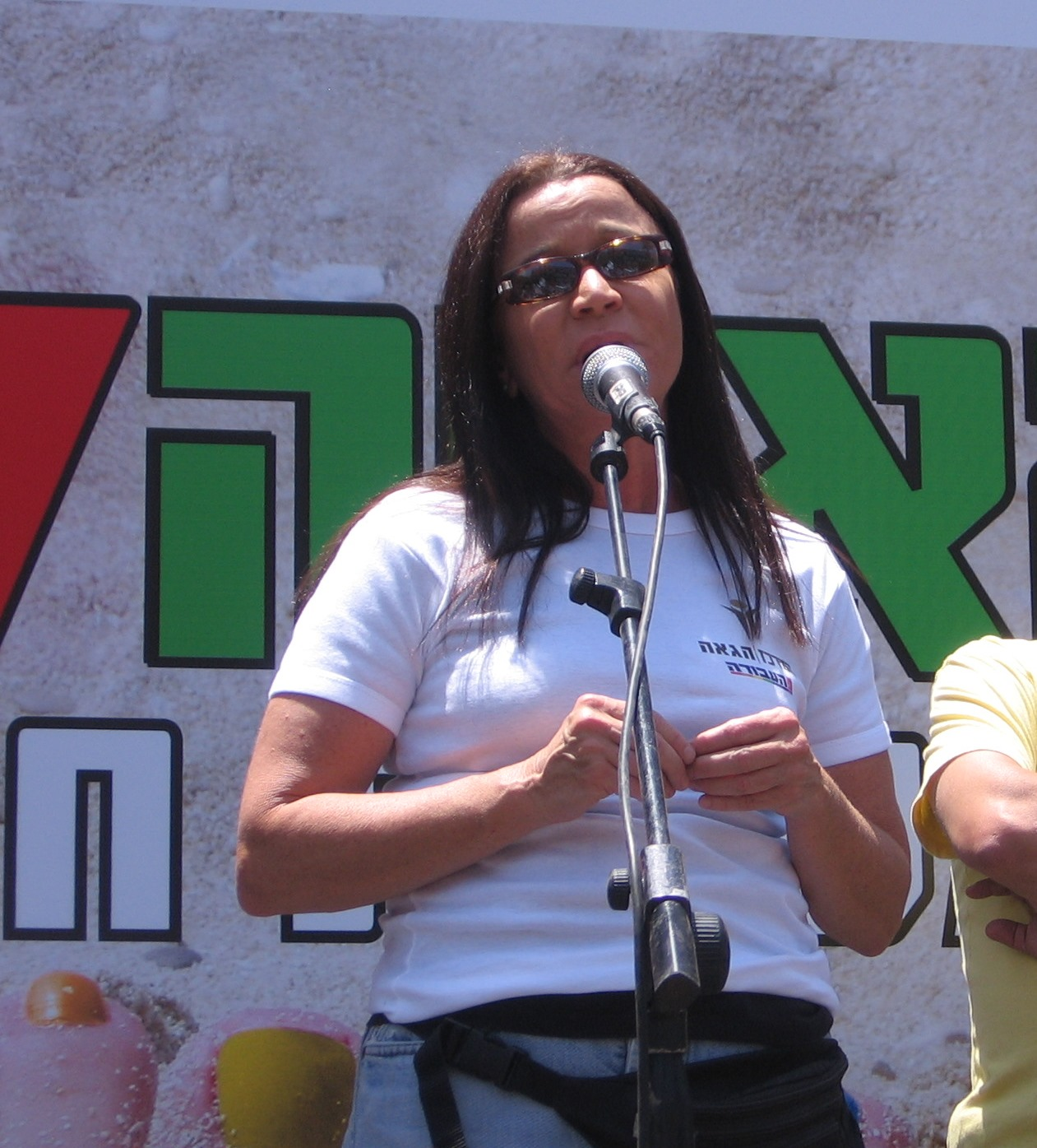 שלי יחימוביץ' במצעד הגאווה בתל אביב - יוני 2007